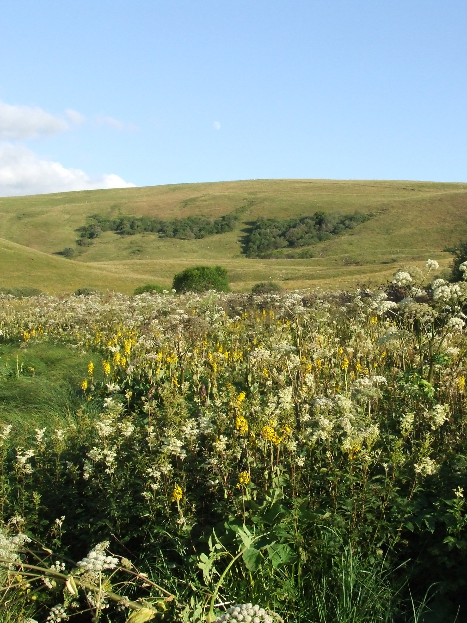 Ligulaire de Sibérie (Ligularia sibirica), espèce relictuelle des dernières glaciations, photographiée ici en France où elle est très rare, dans la tourbière des Chastelets, Puy-de-Dôme.